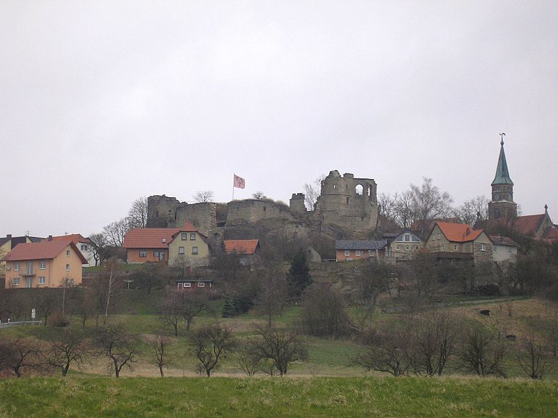 Burg Altenstein in den Haßbergen. Die Burgruine über dem Dorf.